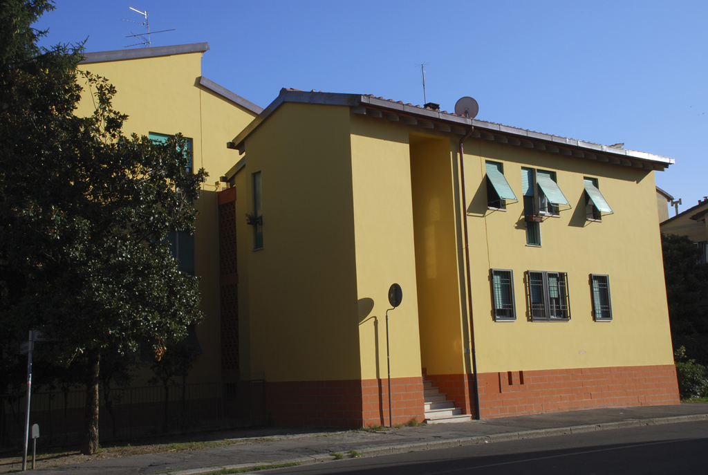 Isolotto (quarter), Florence, Italy. Viale delle Magnolie: Building.